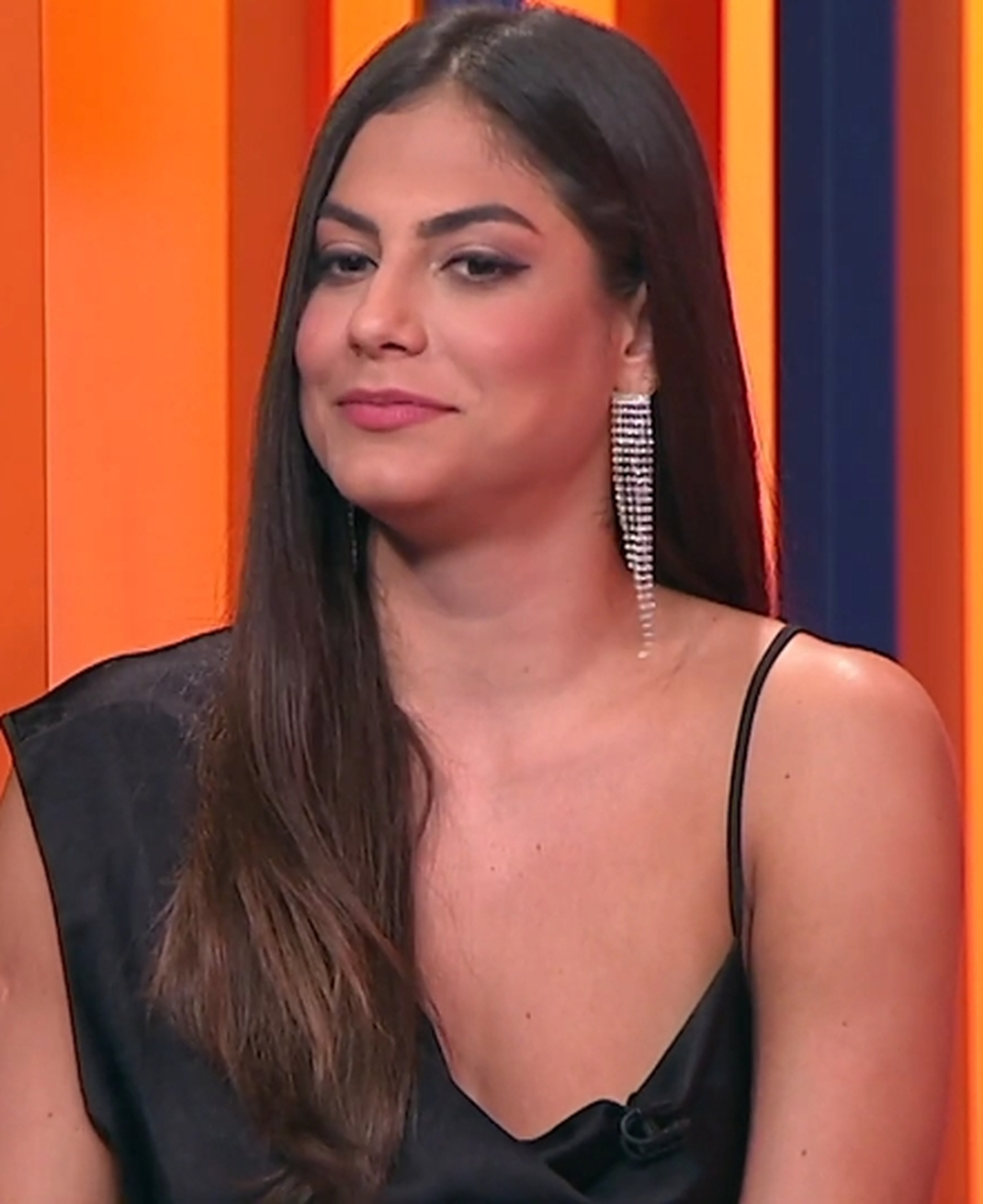 Mari Gonzalez durante a sua participação no programa A Eliminação, exibido no canal no YouTube do Multishow em 23 de abril de 2020.